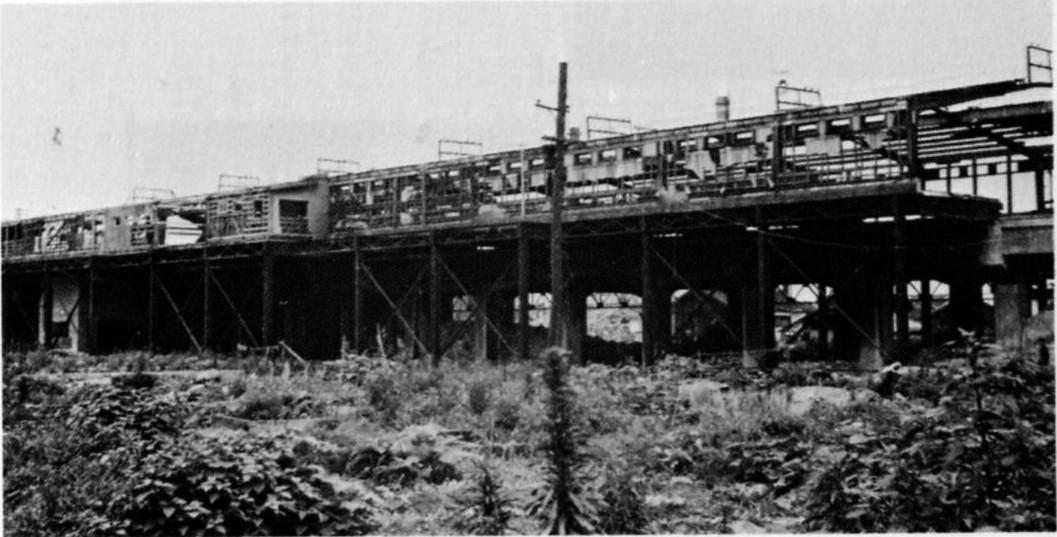 昭和20年(1945年)7月24日の空襲を受けた森ノ宮駅 外観